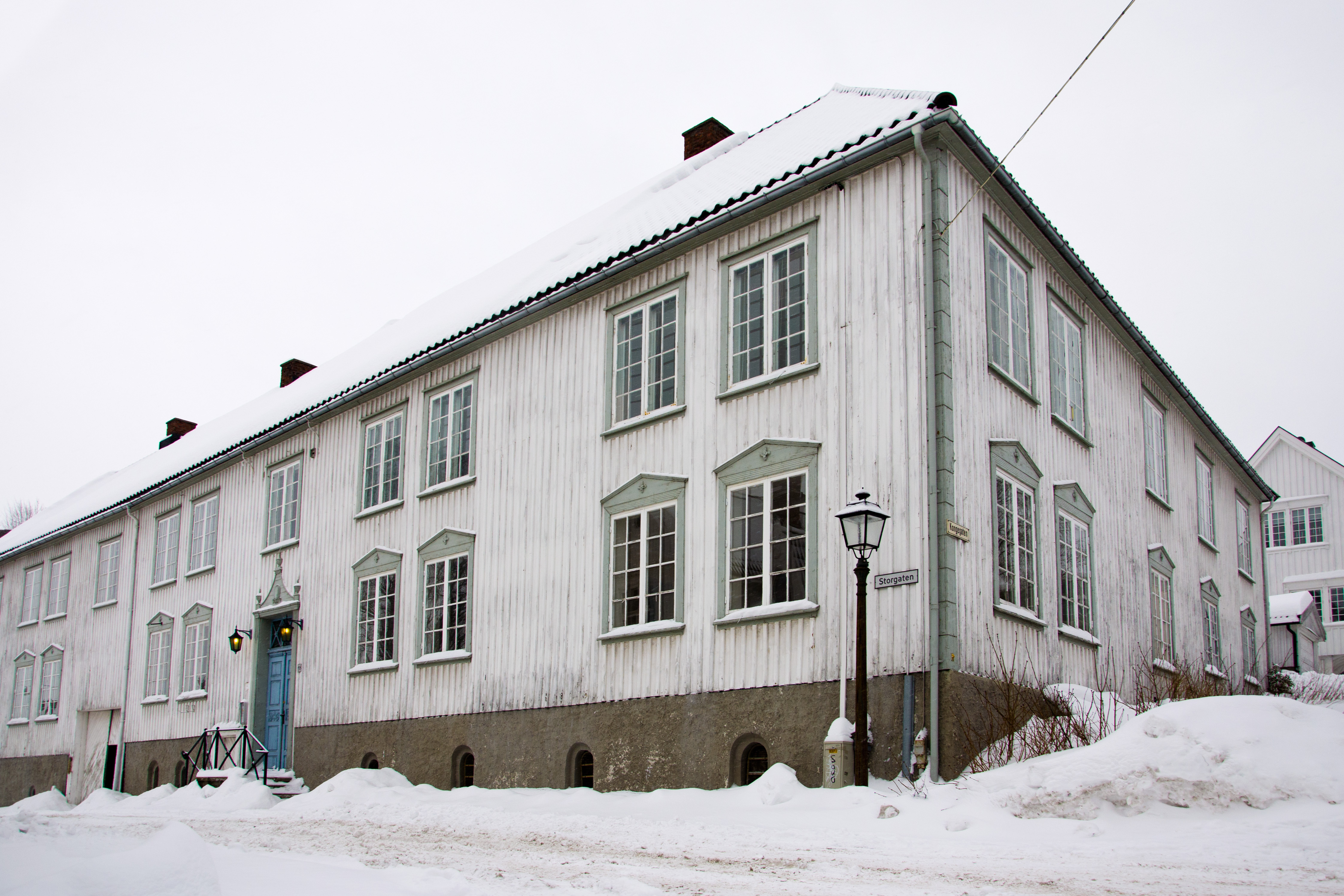 Kossegården fra 1807, Storgaten 55, Tønsberg